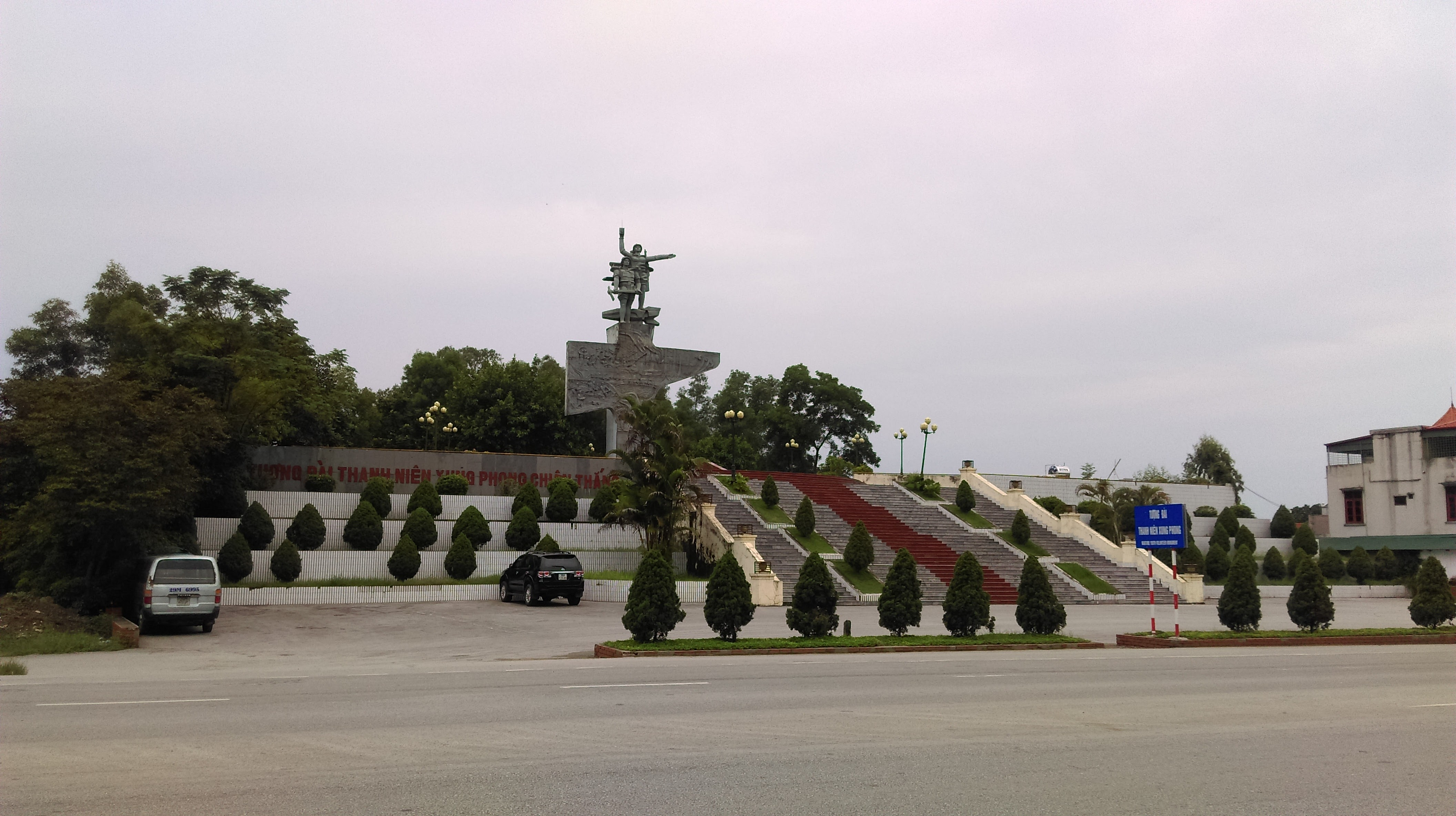 Tượng đài Thanh niên Xung phong, Hàm Rồng, Thanh Hóa